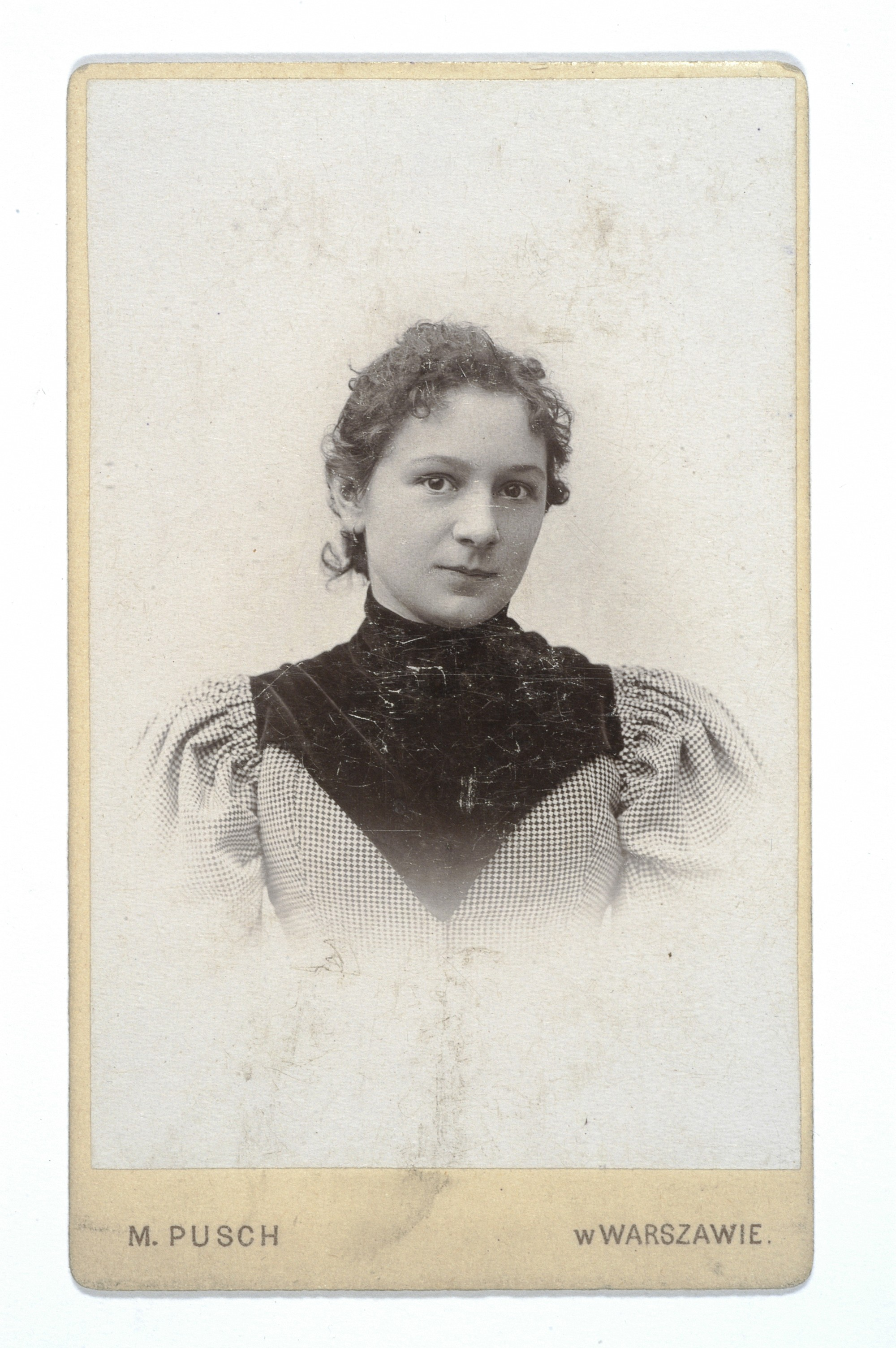 Portret Michaliny Rogińskiej, ok. 1898